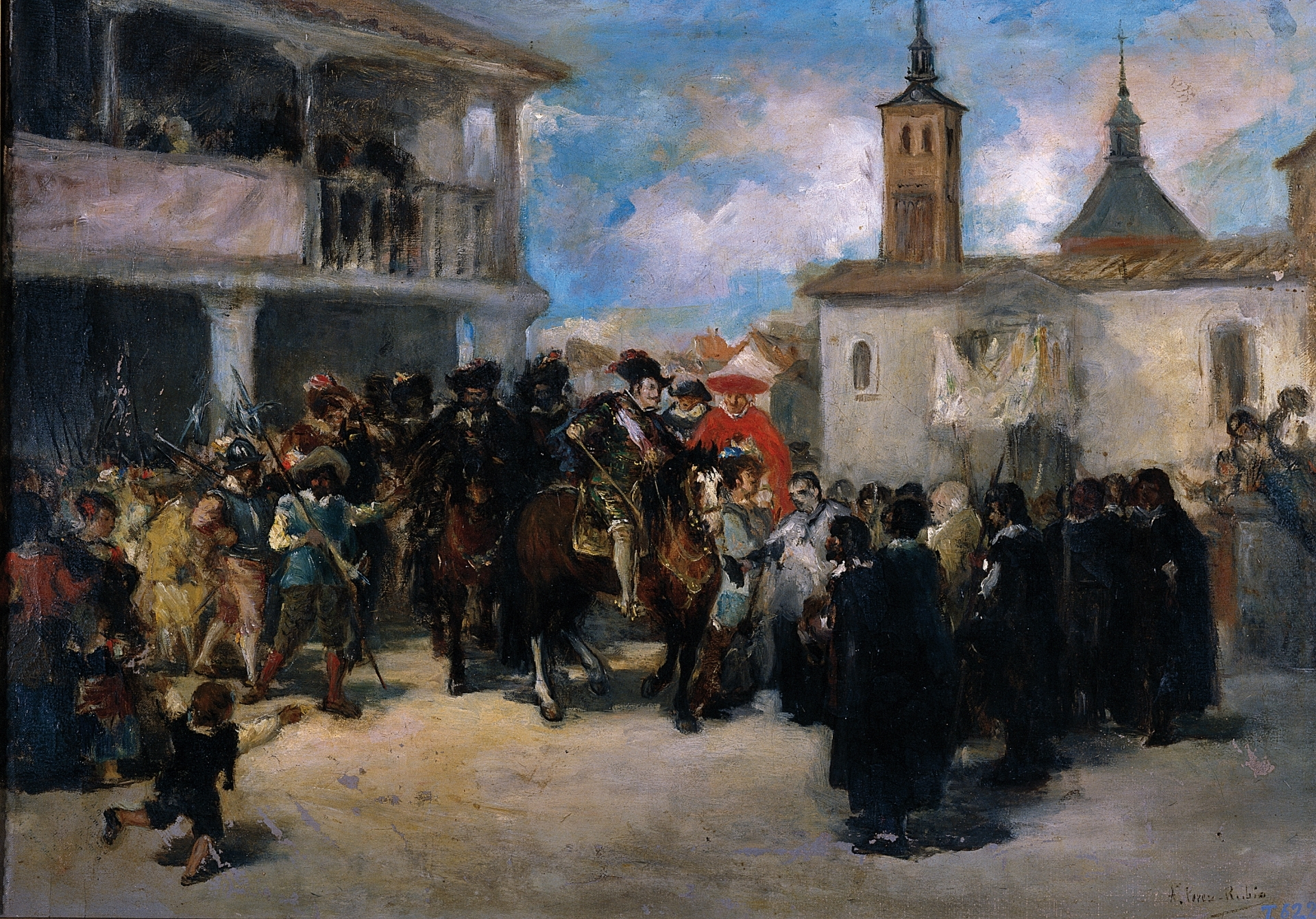 El rey Felipe IV en Navalcarnero (hacia 1884), de Antonio Pérez Rubio. Óleo sobre lienzo, 45 x 60 cm. Museo del Prado, Madrid, España